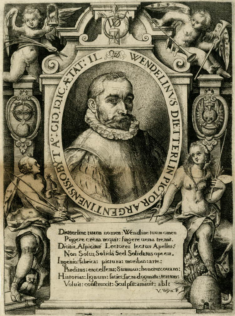 Portrait des Wendel Dietterlin im Alter von 49 Jahren zum Zeitpunkt seines Todes, angefertigt nach einem Selbstportrait